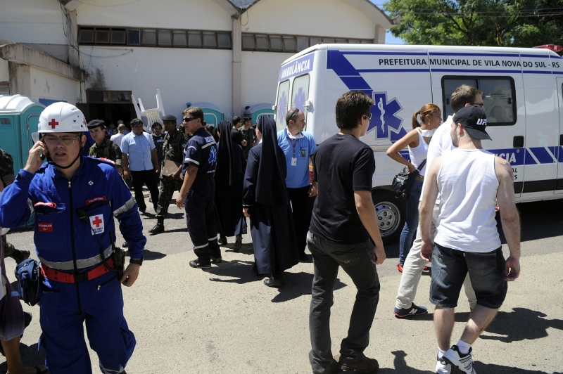 Corpos das vítimas do incêndio na Boate Kiss foram levados para o Centro Desportivo Municipal.